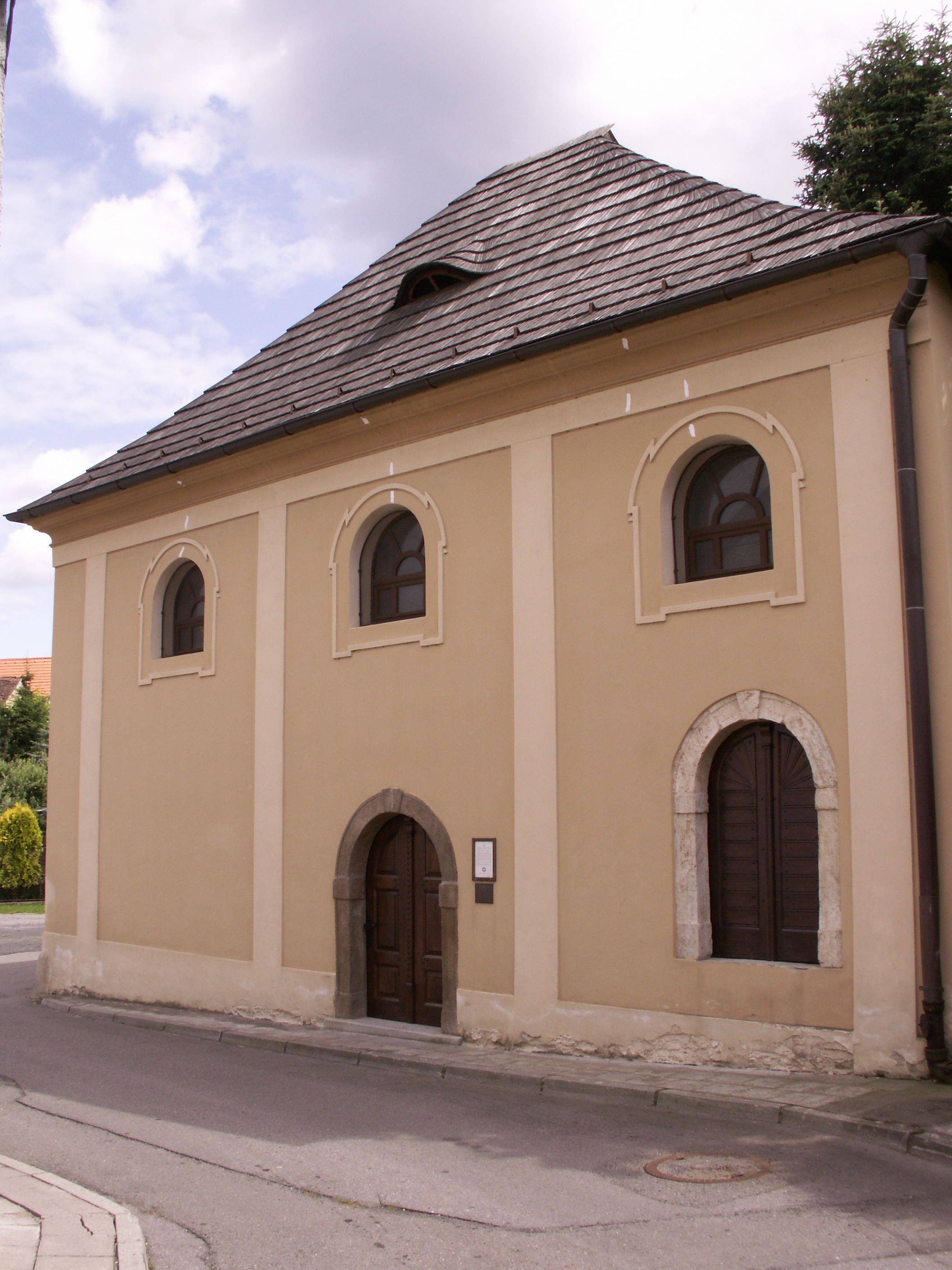 synagoga v Ledči nad Sázavou, ulice Na Potoce, rok 1739, styl vesnického baroka